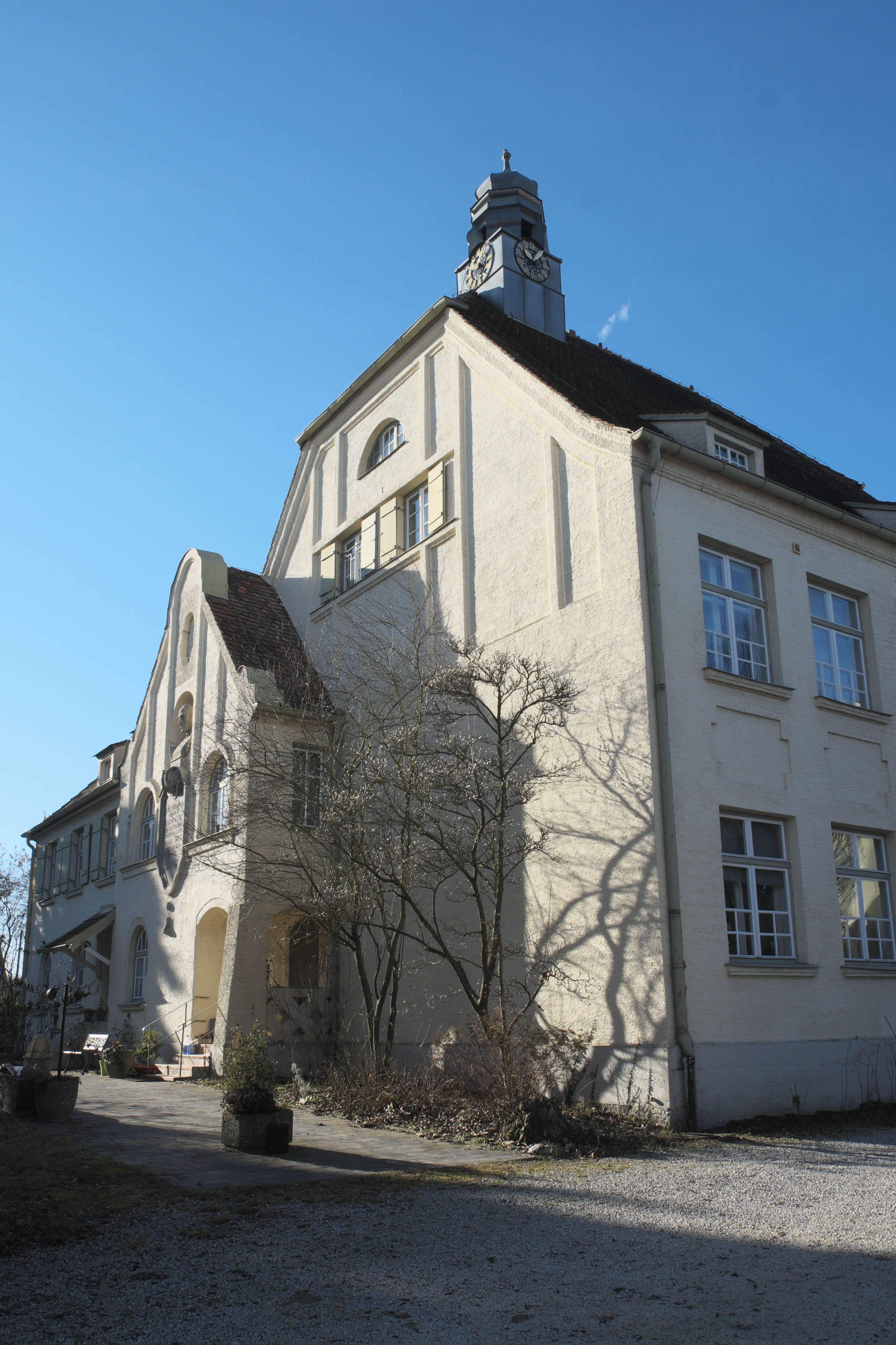 Ehemalige Schule in Ainau (Geisenfeld) im Landkreis Pfaffenhofen an der Ilm (Bayern/Deutschland)